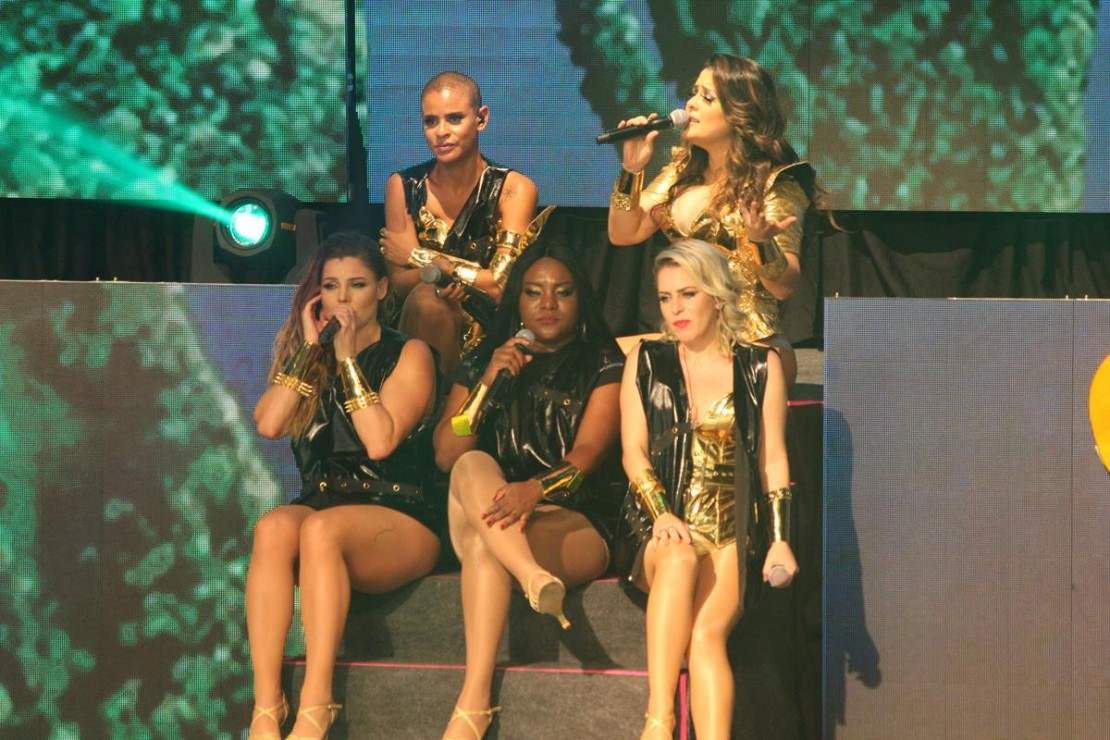 Rouge cantando Cidade Triste na turnê em 2018